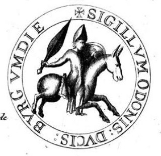 Odo II. Burgundský